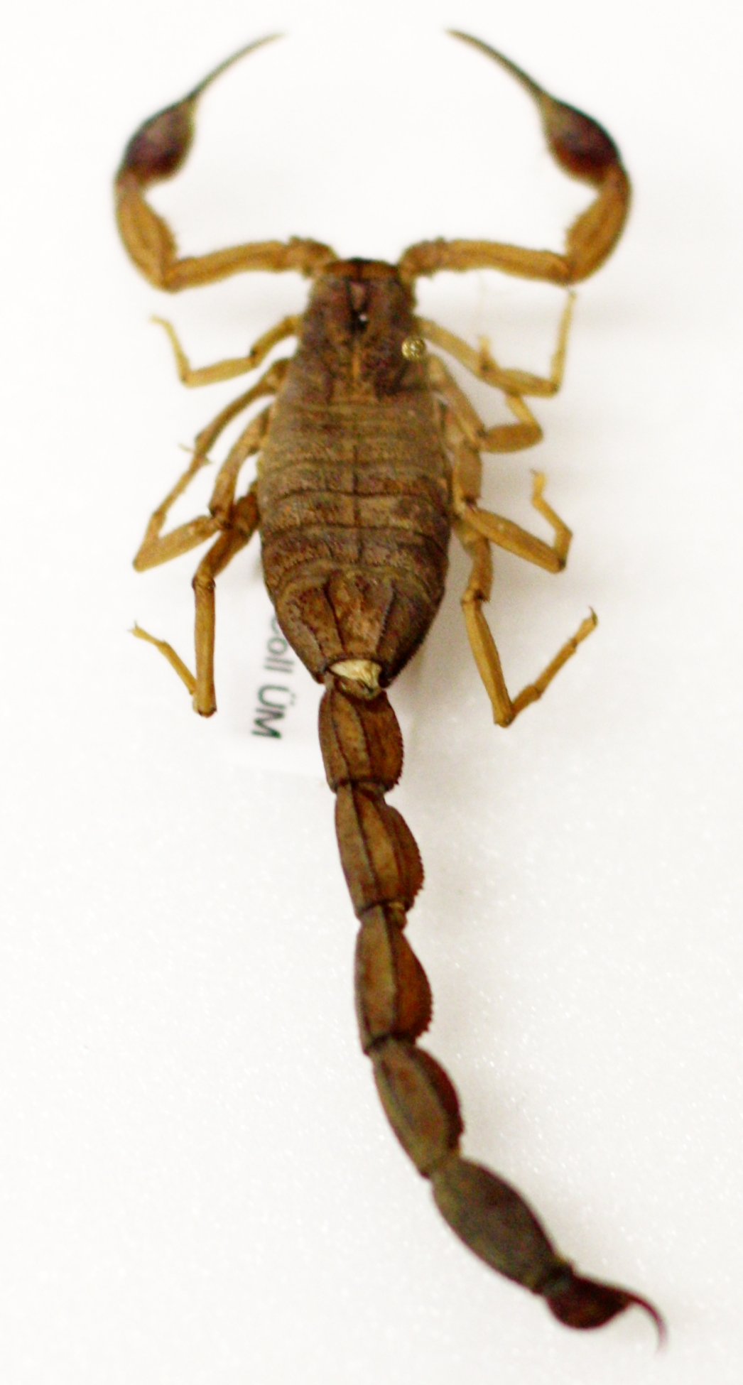 Naturkundliche Sammlung Übermaxx Überseenuseum Bremen; Schmetterlinge und andere Centruroides margaritatus (Gervais, 1841)